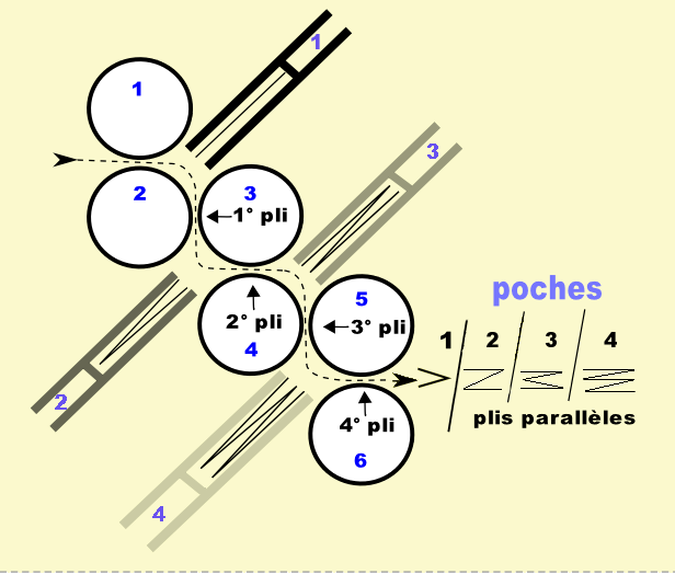 plieuse à poches industrielle réalisation perso.